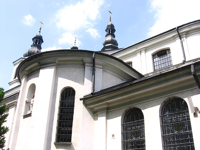 Kościół św. Antoniego na Wzgórzu Gołonoskim